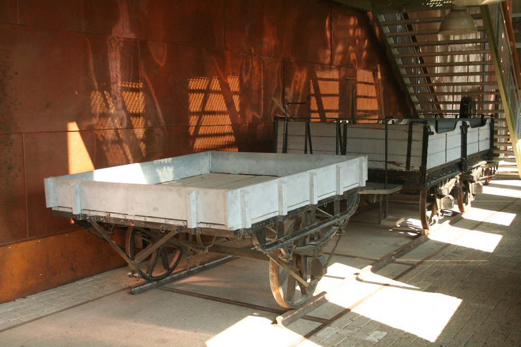 Nederlands Spoorwegmuseum wagen NTM G1. Foto: Erik Swierstra.